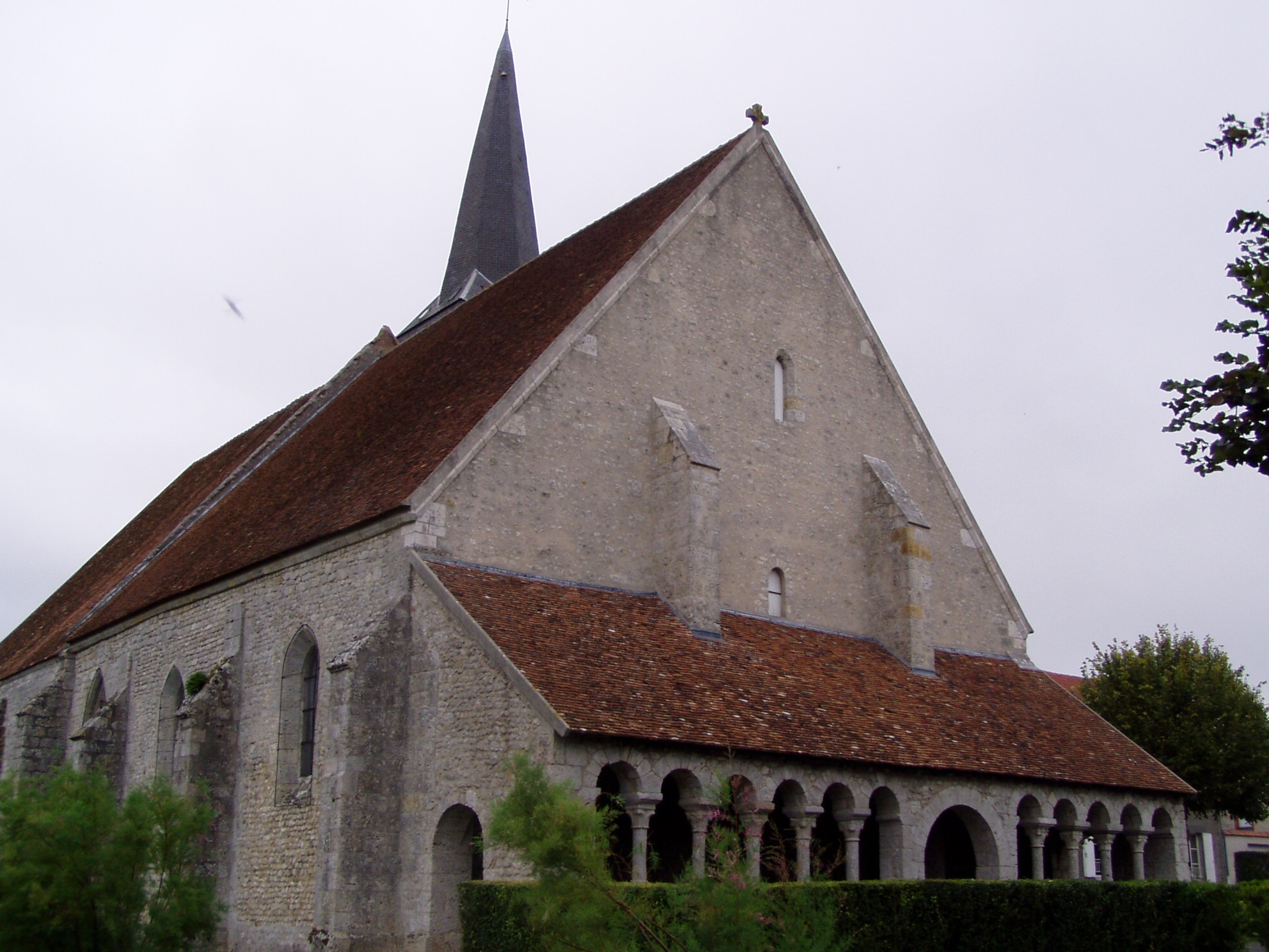 photographie de l'église de Boësses dans le Loiret, prise par Accrochoc, le 04 septembre fr:2006